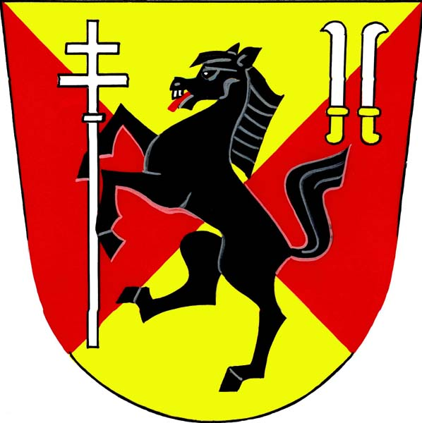 Znak obce Ludíkov